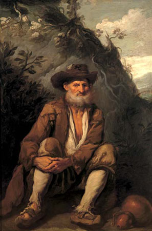 Antonio Carneo Il giramondo olio su tela Musei Civici - Udine